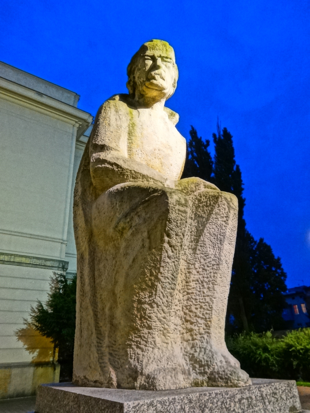 Rzeźba Ignacego Jana Paderewskiego stojąca przed frontem Filharmonii Pomorskiej w Bydgoszczy